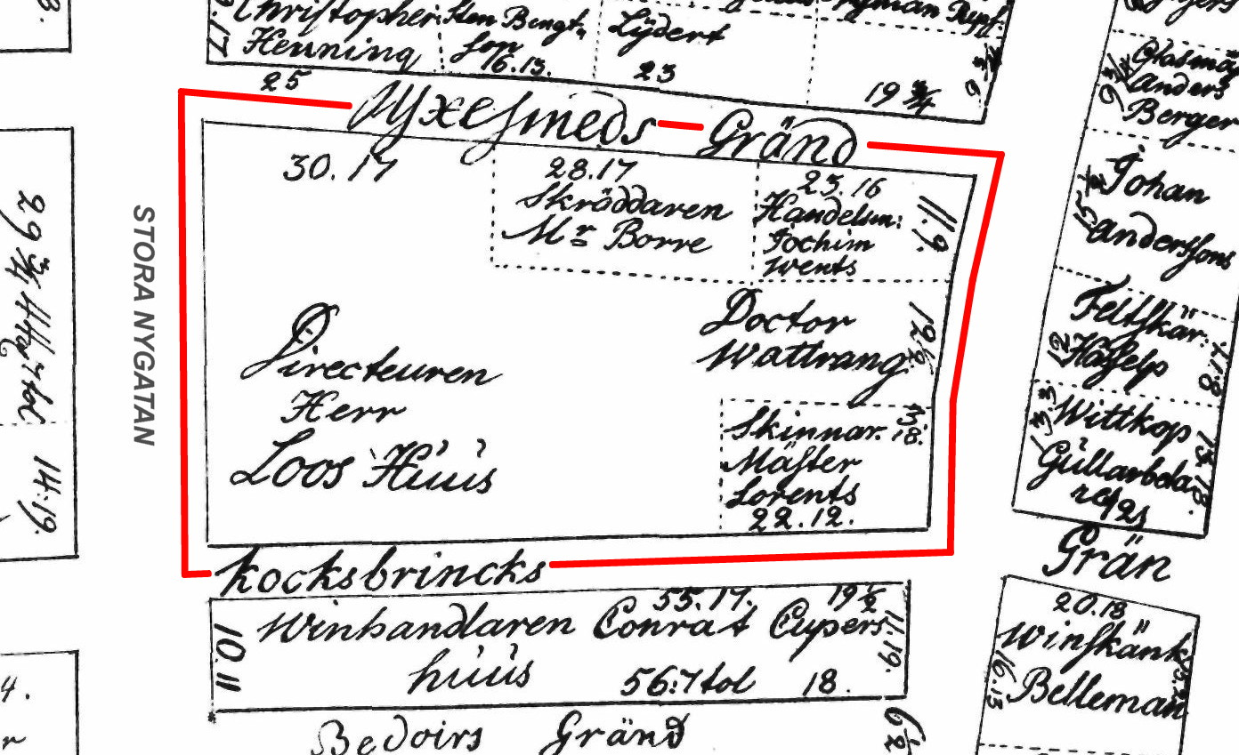 Del av tomtkarta nordvästra Gamla stan 1693 med kvarteret Ulysses